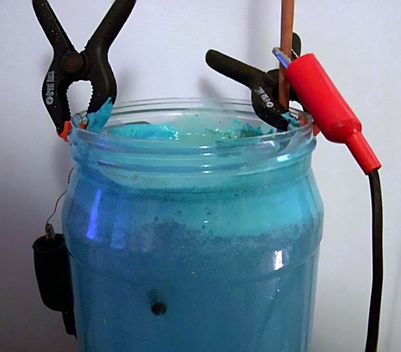 Nebraska Bob 01:14, 20 April 2007 (UTC)